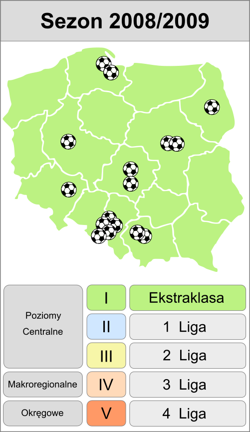 Jagiellonia w sezonie 2008/2009 - mapa